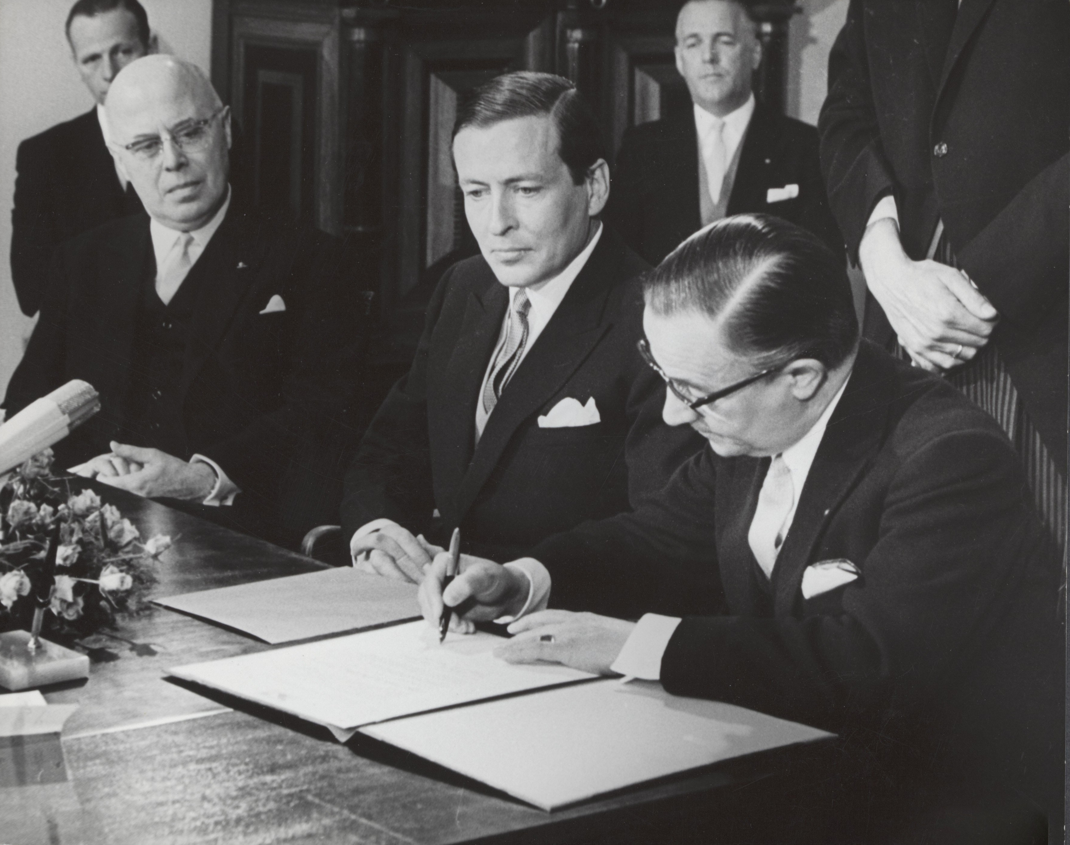 Collectie / Archief : Fotocollectie Elsevier Reportage / Serie : [ onbekend ] Beschrijving : koninklijk huis, prinsen, geboorten, actes, handtekeningen, stadhuizen, minister-presidenten, Beel, Louis, Claus, prins, Utrecht Datum : 2 mei 1967 Locatie : Utrecht Trefwoorden : actes, geboorten, handtekeningen, koninklijk huis, minister-presidenten, prinsen, stadhuizen Persoonsnaam : Beel, Louis, Claus, prins, Jong, Piet de Fotograaf : Fotograaf Onbekend / Anefo Auteursrechthebbende : Nationaal Archief Materiaalsoort : Foto (zwart/wit) Nummer archiefinventaris : bekijk toegang 2.24.05.02 Bestanddeelnummer : 018-0296